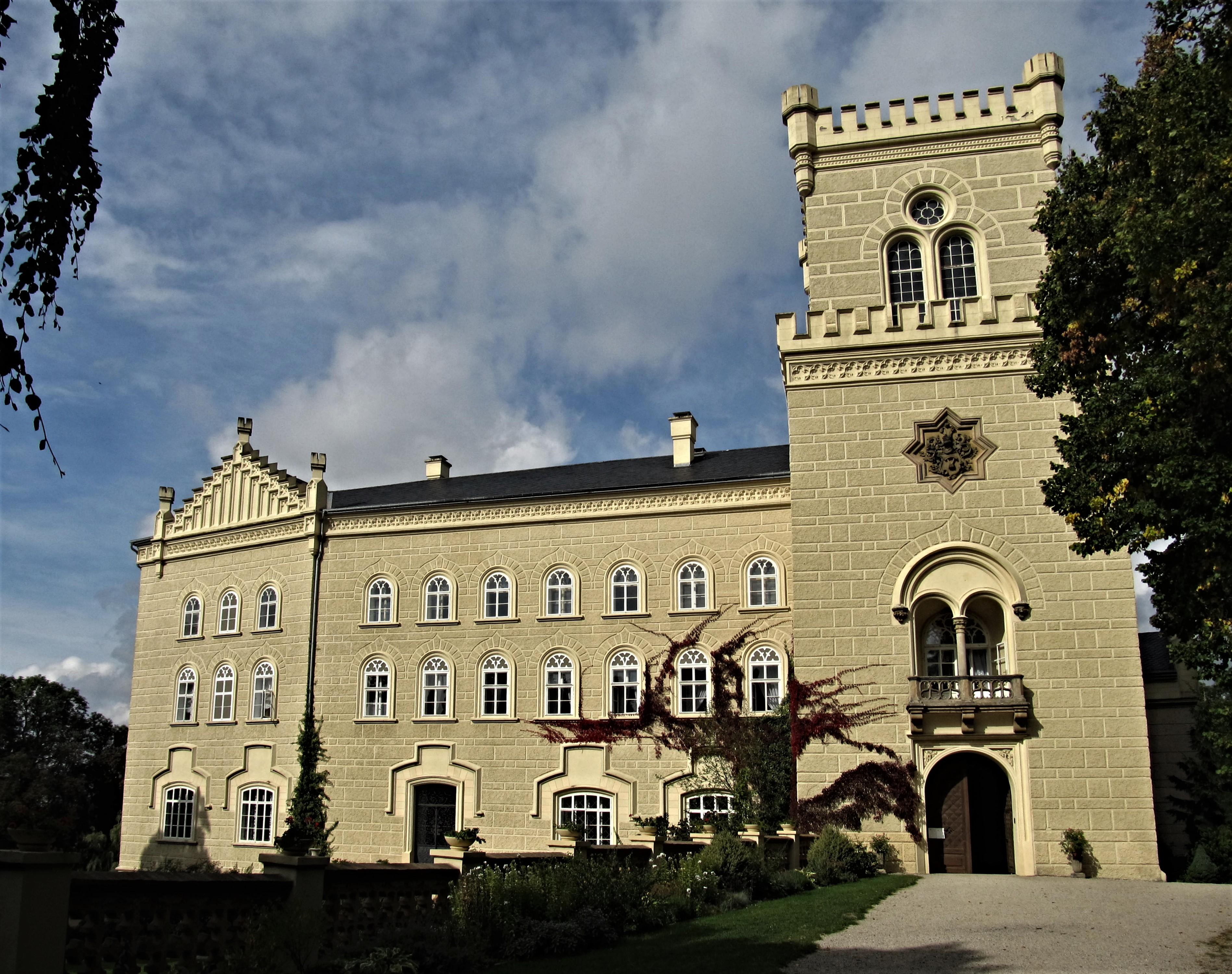 Hlavní průčelí zámku